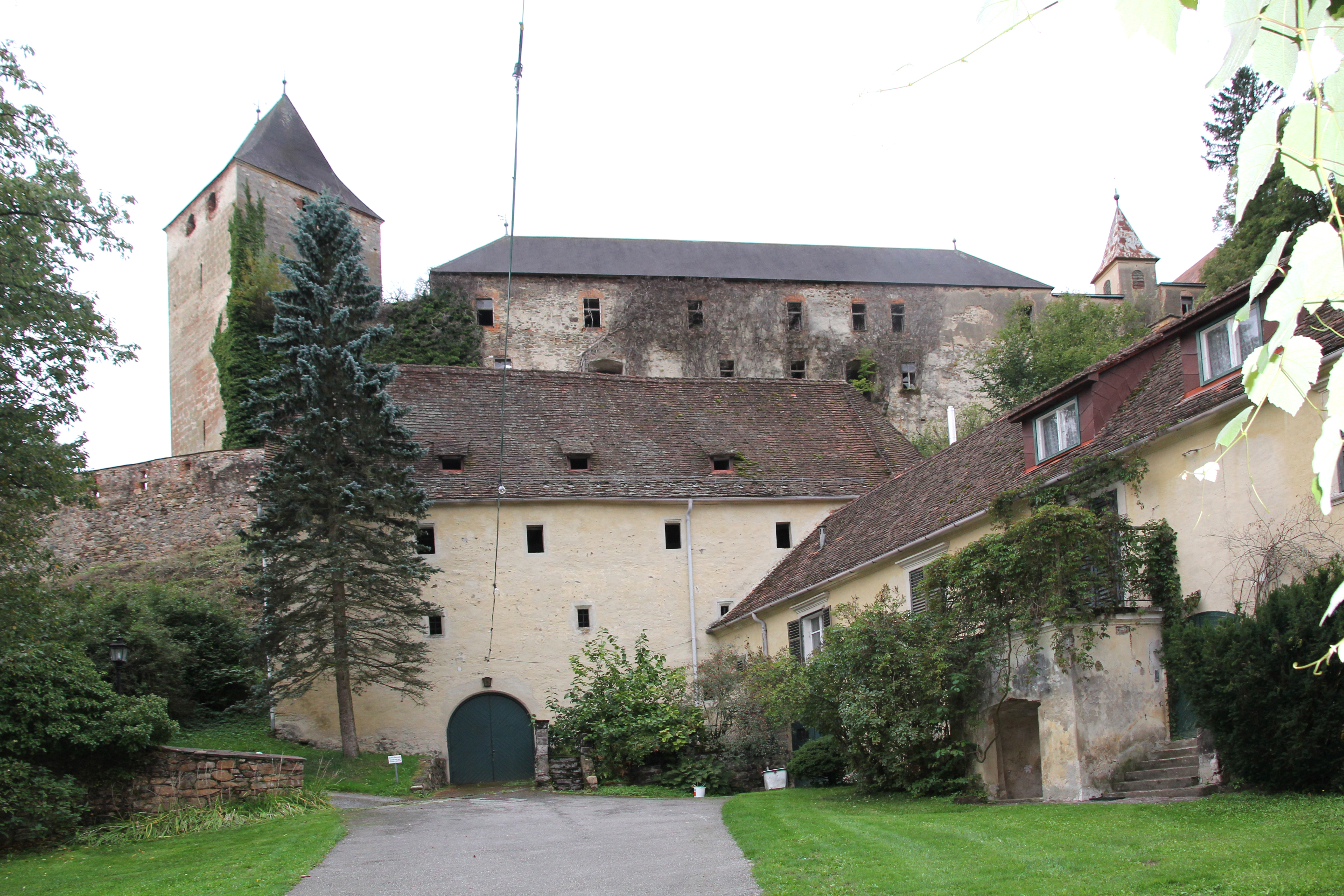 Burg Thalberg, gotisches Haus und Hochburg mit Bergfried